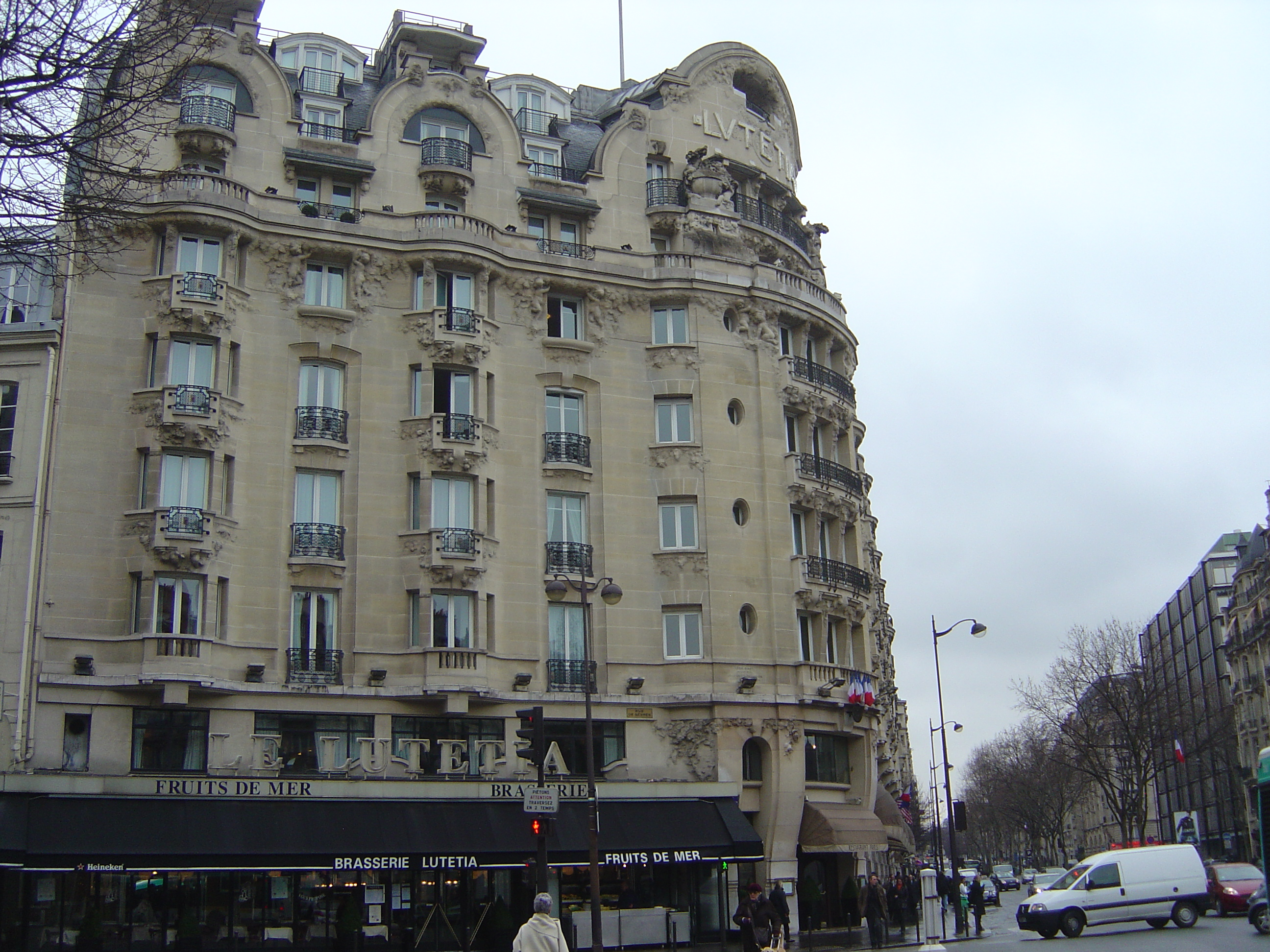 Hôtel Lutetia